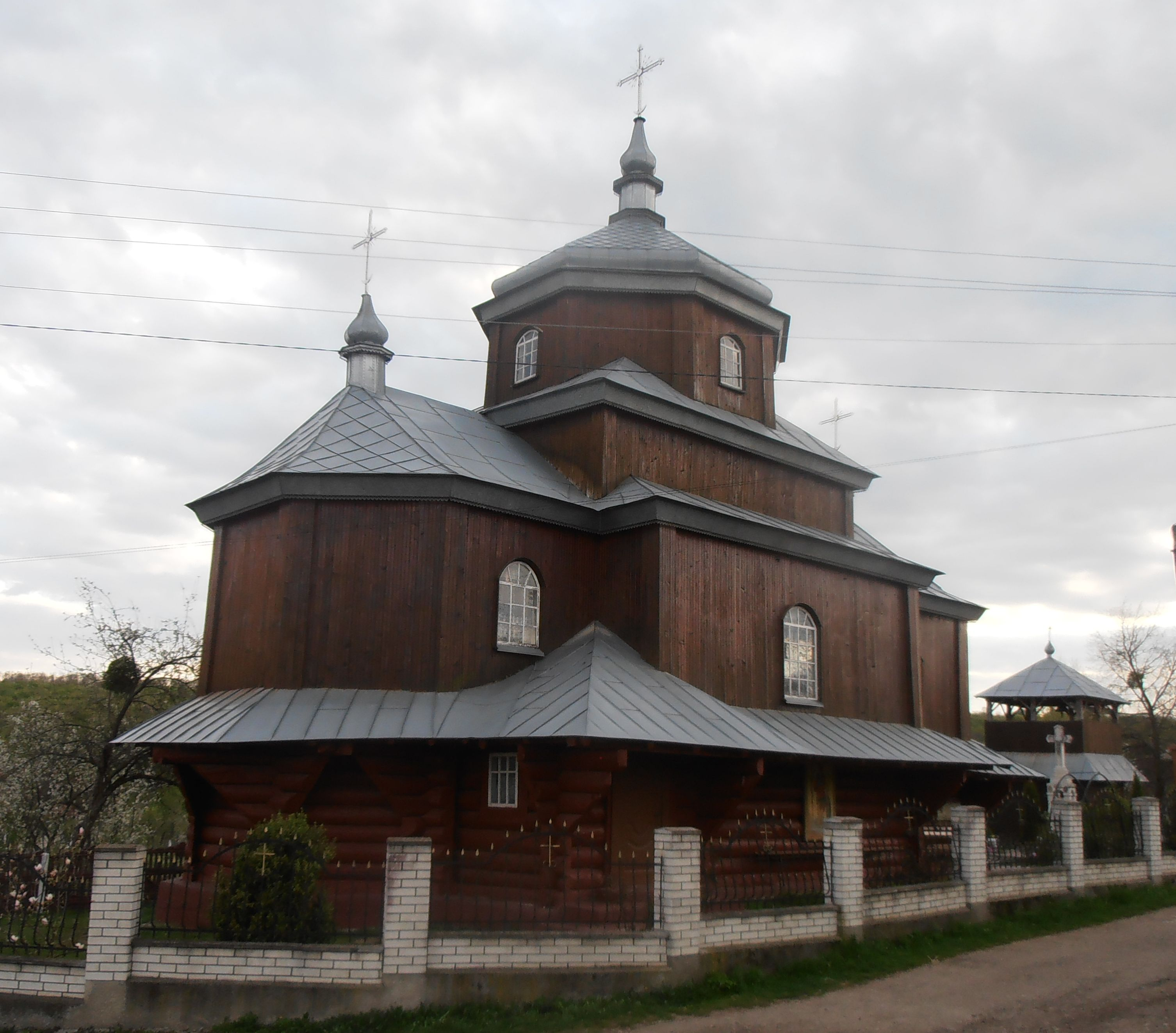 Церква Св. Дмитрія (дер.), Слобідка